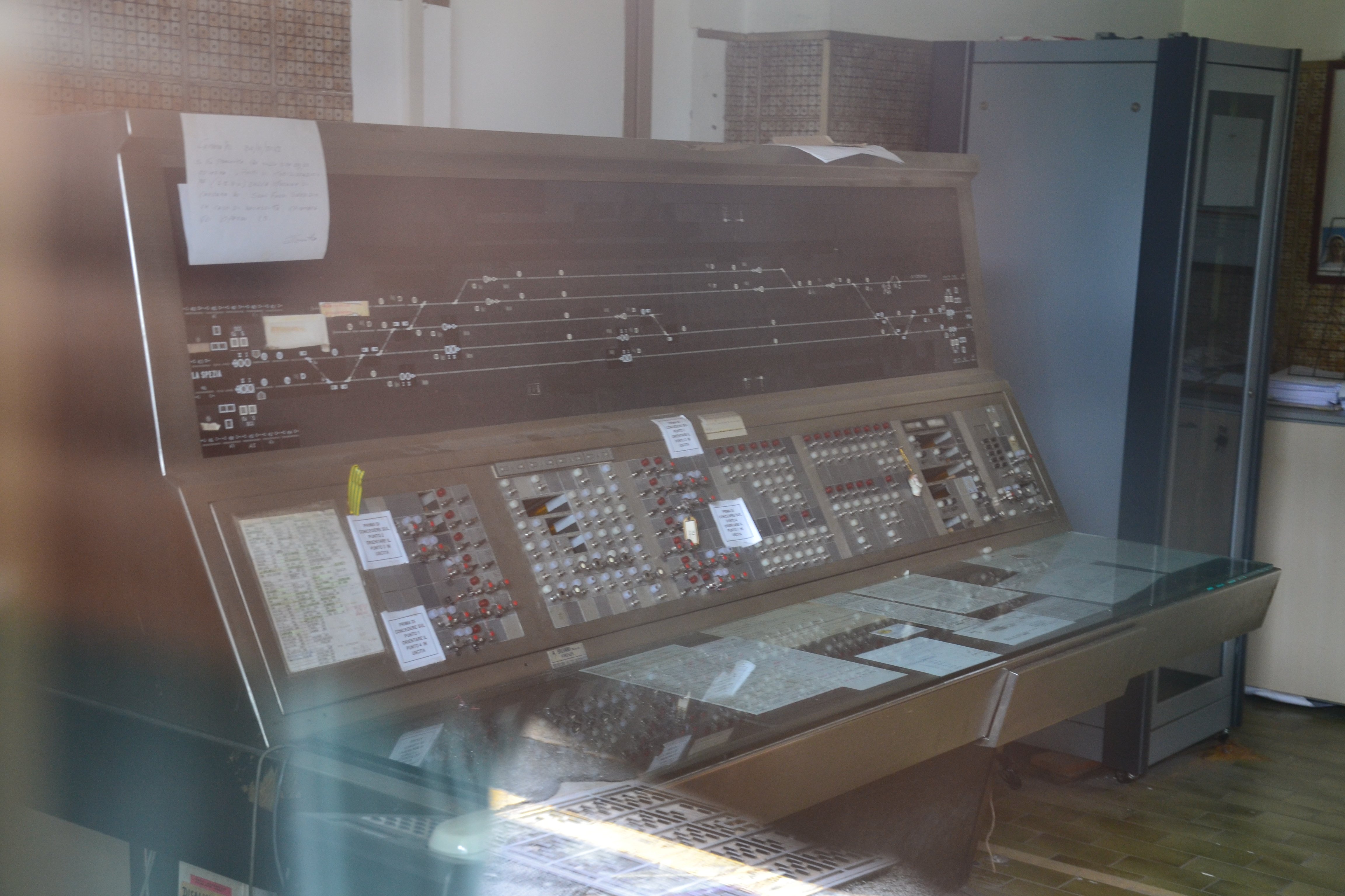 Particolare del quadro ACEI della stazione.